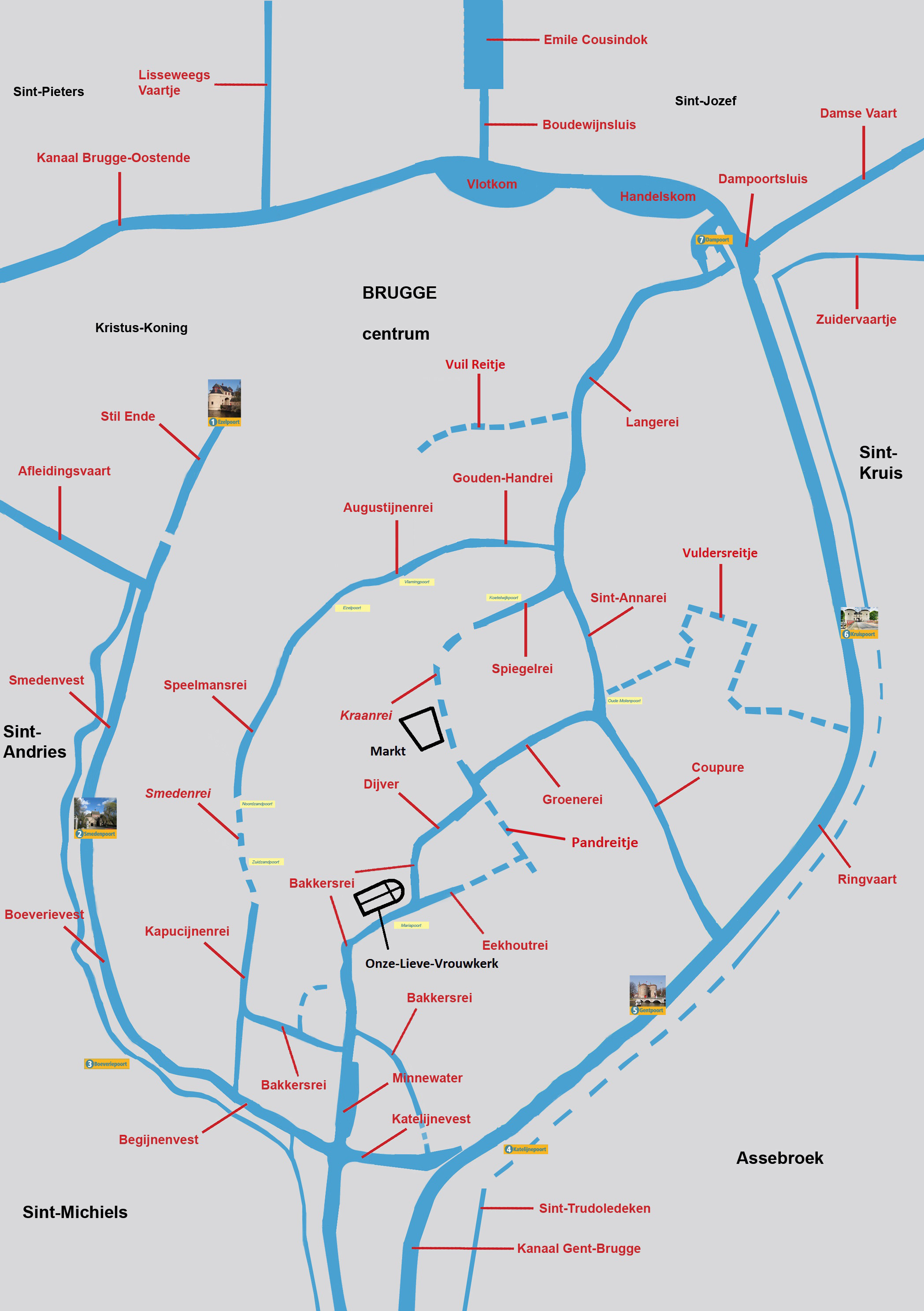 Stadspoorten en waterlopen Brugge, met enkel aanvullingen.